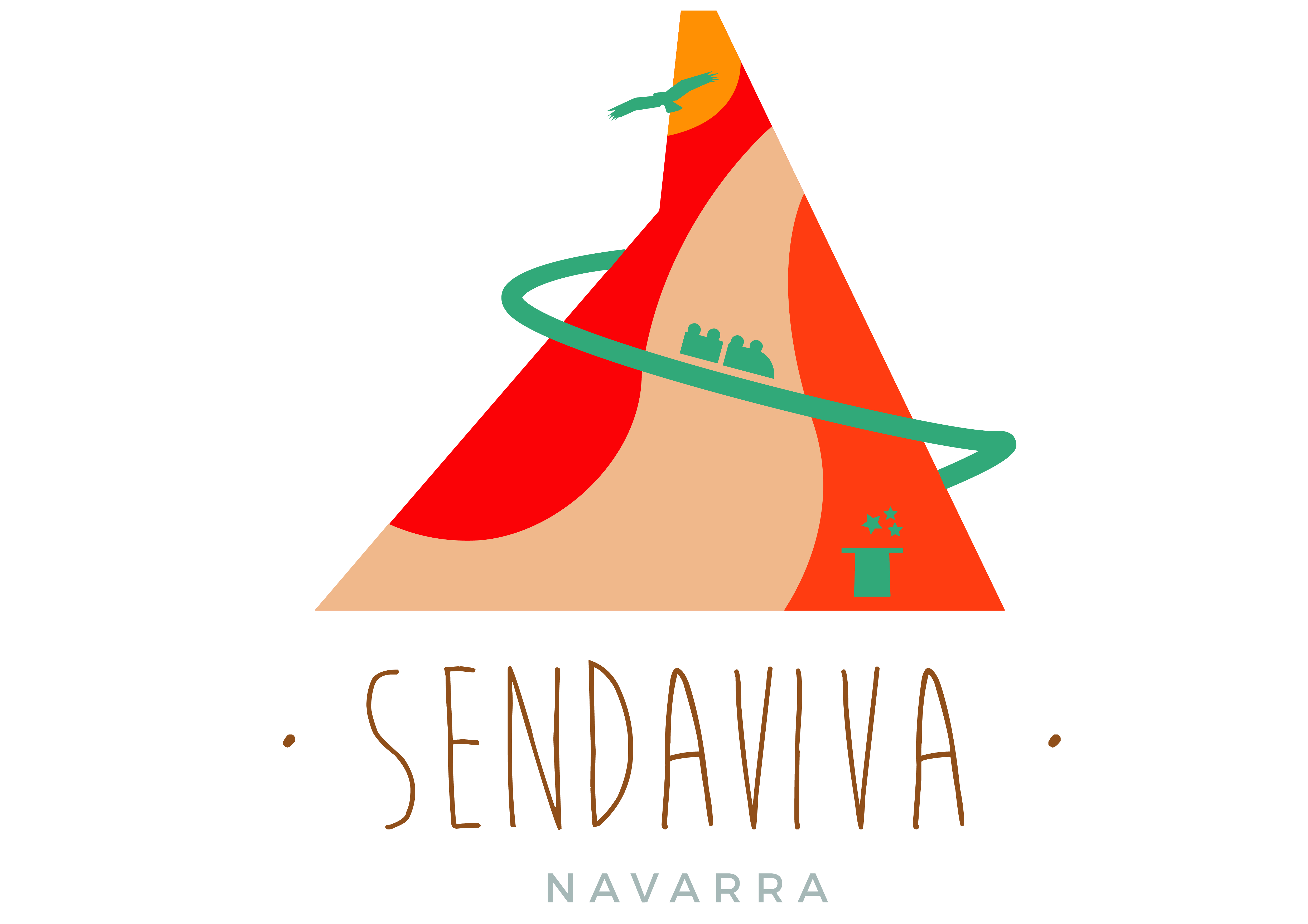 Sendaviva, Navarra